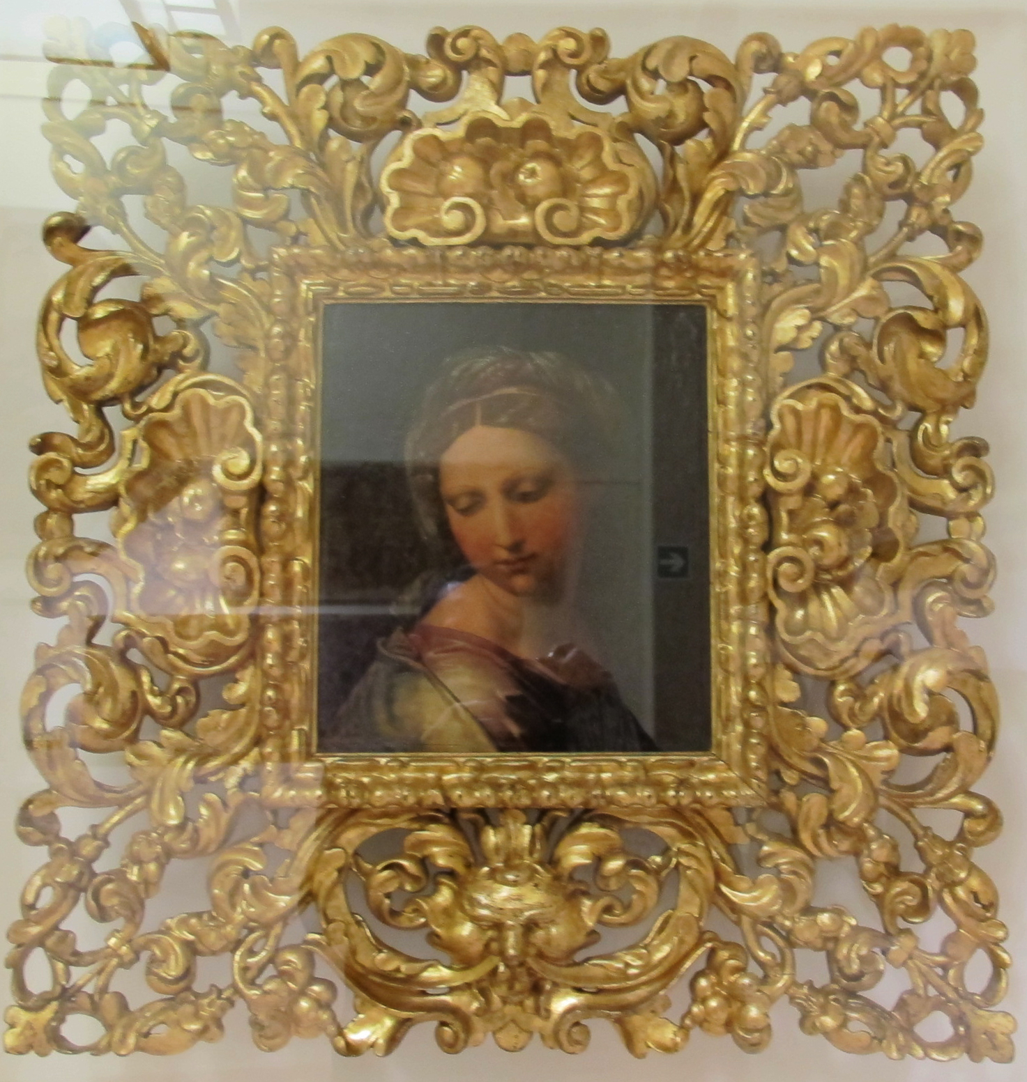 La perla di modena